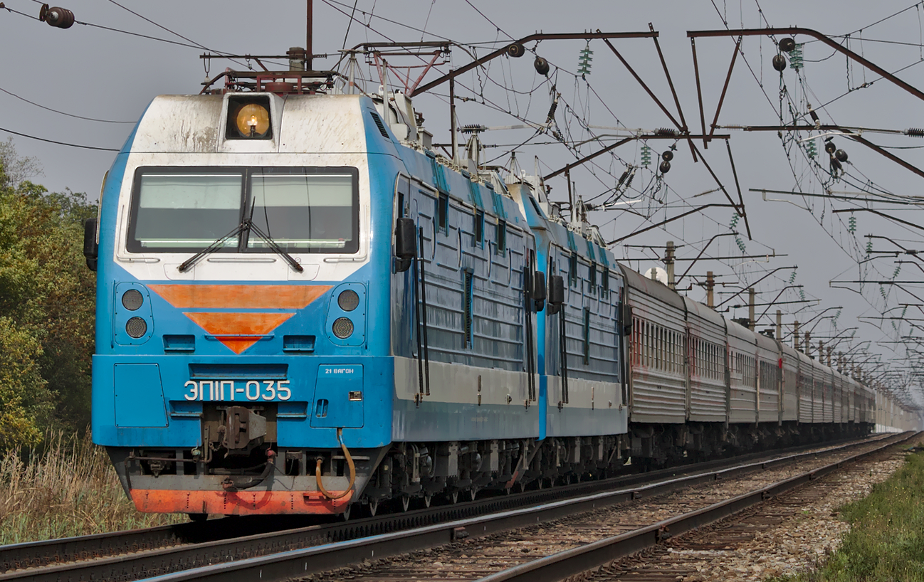 ЭП1П-035, ЭП1*-*** и поезд Санкт-Петербург - Владикавказ, Коноково. см. фото 542170 в альбоме автора